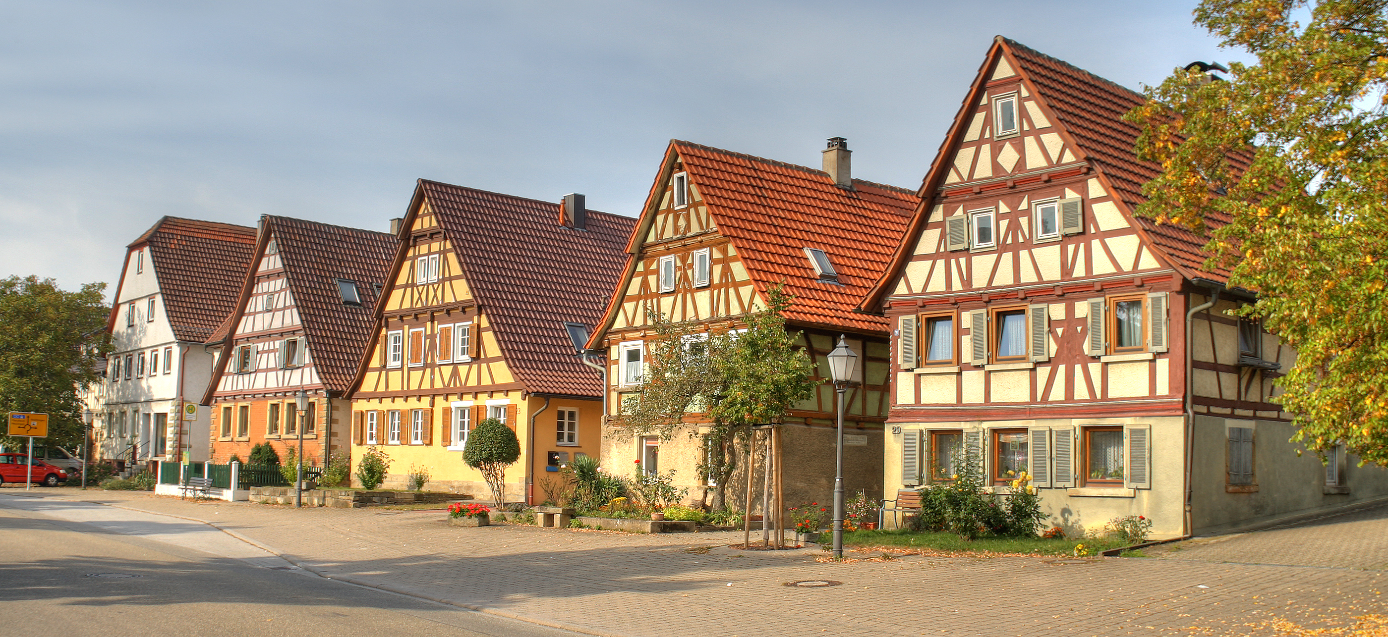 Fachwerkarchitektur in Ölbronn bei Pforzheim